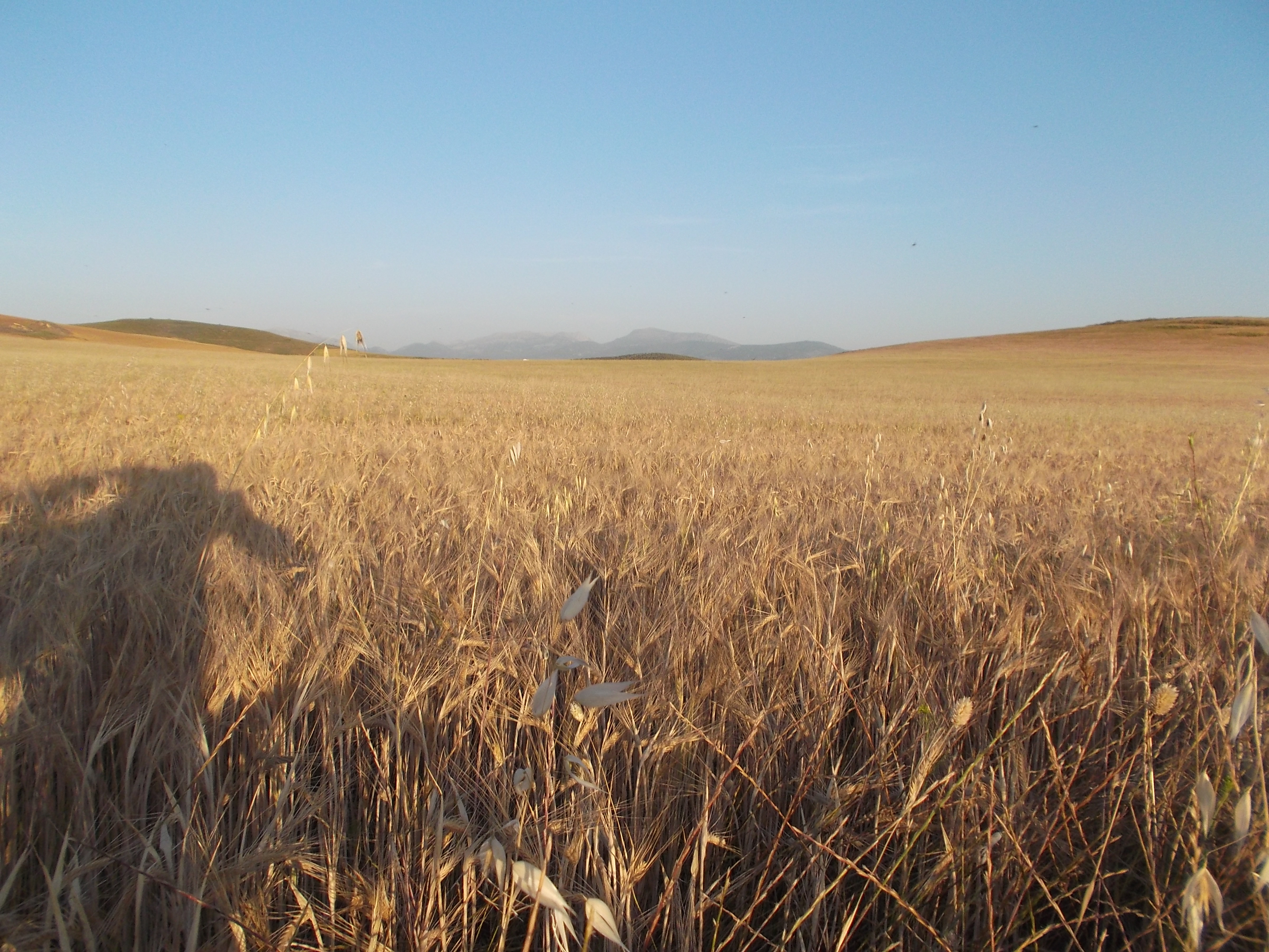 Campo de cebada. Lomas de Terrace, Jaén.